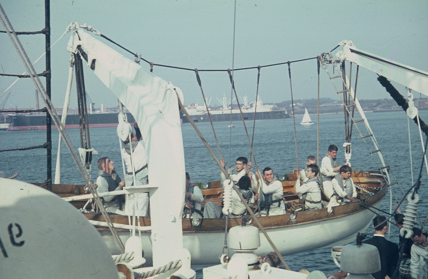 Ausbringen vom Steuerbordkutter der Gorch Fock (1958) an der Blücherbrücke in Kiel